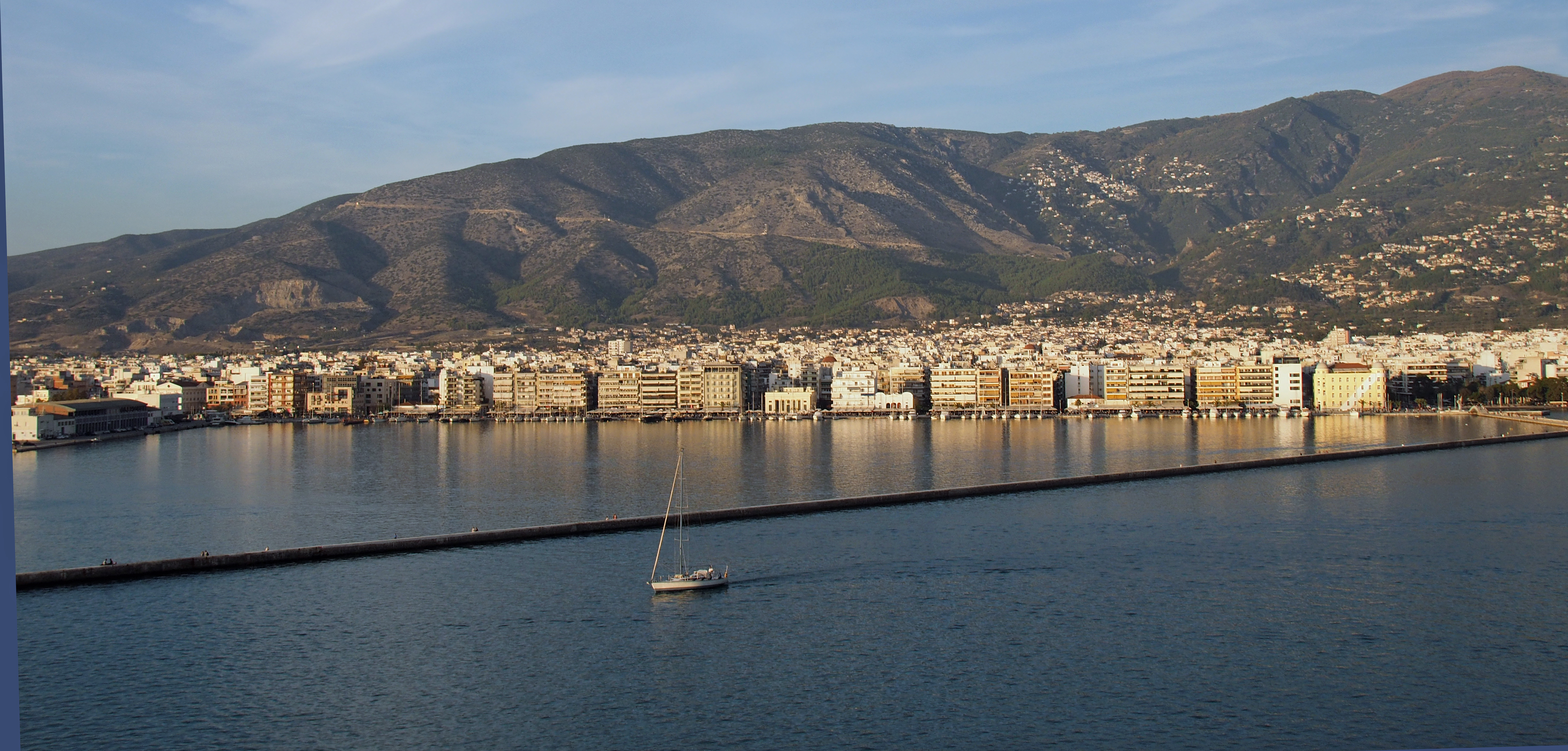 Volos (Griechenland), Promenade und City